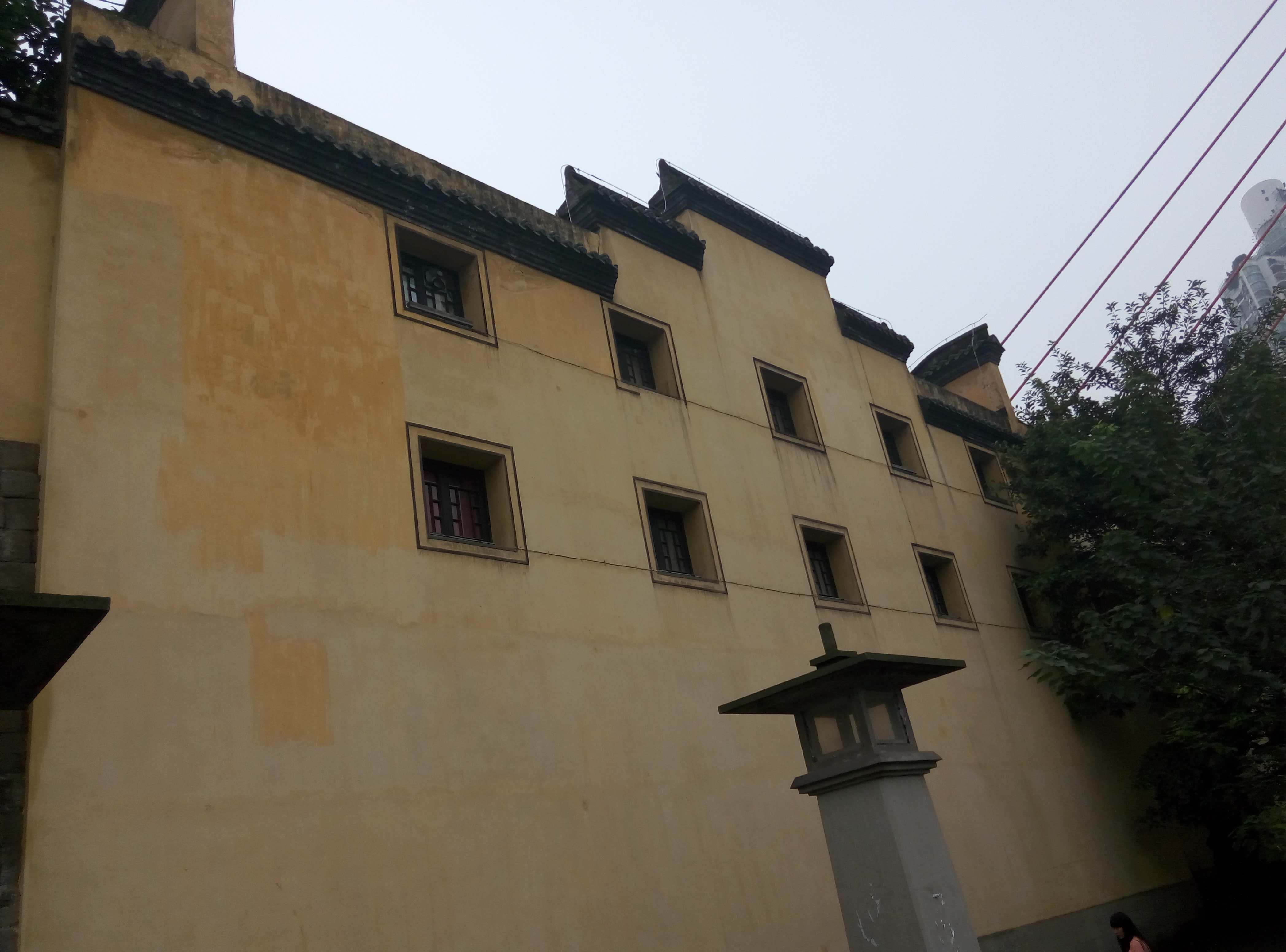 粵語: 重慶湖廣會館